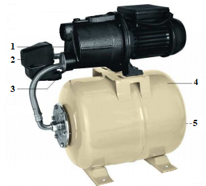 1 pav. Hidroforas: 1-siurblys; 2-slėgio rėlė; 3-manometras; 4-išsiplėtimo bakas; 5- oro įpūtimo vieta